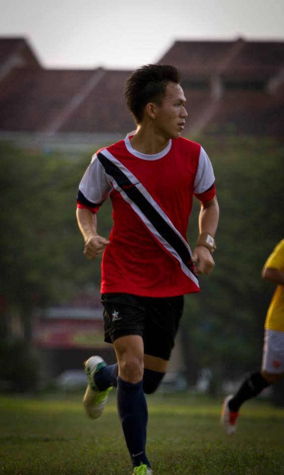 ZORAN ROBERTSON